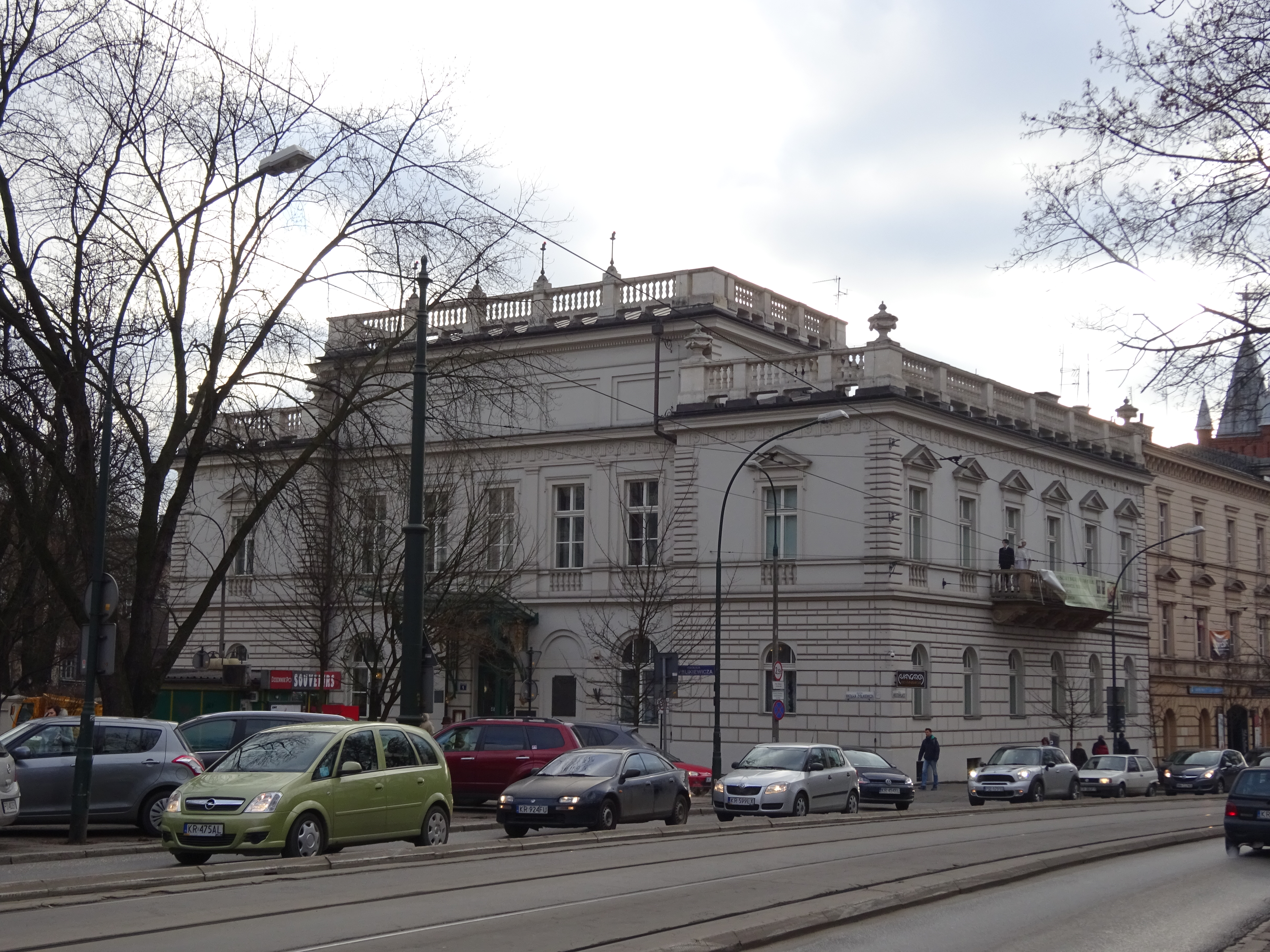 Kasyno Oficerskie w Krakowie, przy ulicy Zyblikiewicza.